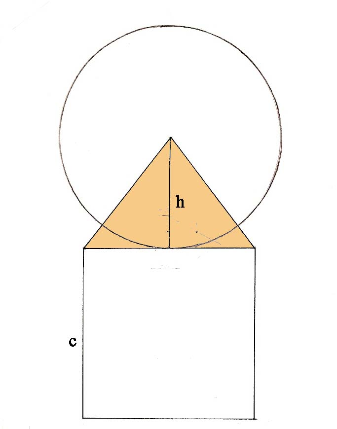 Relations de surfaces de la pyramide de Khéops